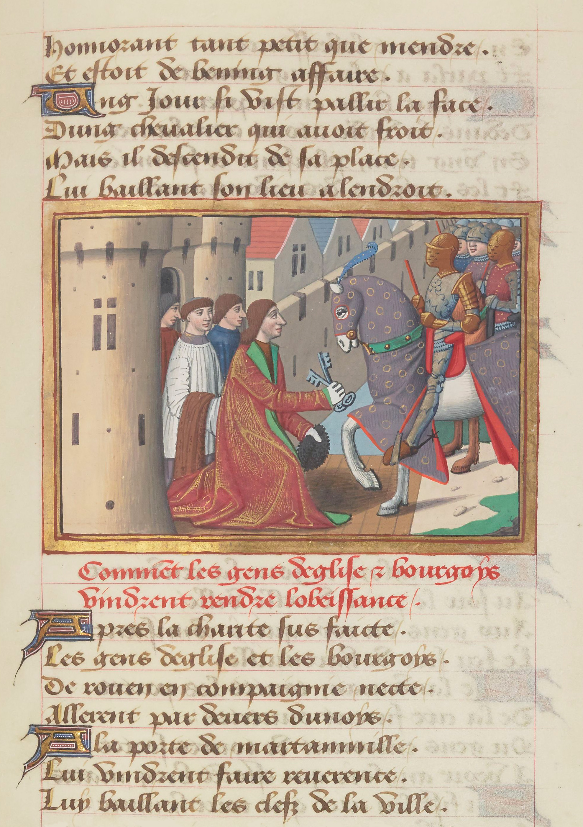 Reddition de Rouen (1449). Enluminure ornant le manuscrit de Martial d'Auvergne, Les Vigiles de Charles VII, vers 1484, BnF, Manuscrit Français 5054, folio 177 recto.